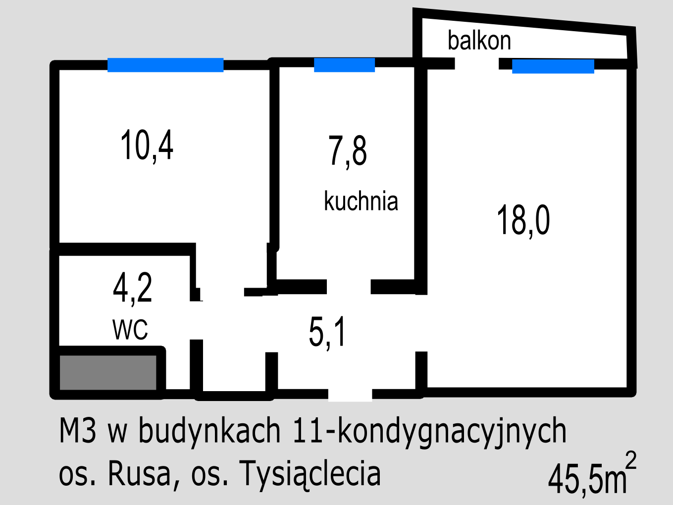 Mieszkanie M3 według normatywu docelowego w budynkach 11-kond. na os. Rusa i Tysiąclecia